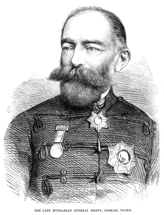 György Kmety (24. Mai 1813 - 25. April 1865 )